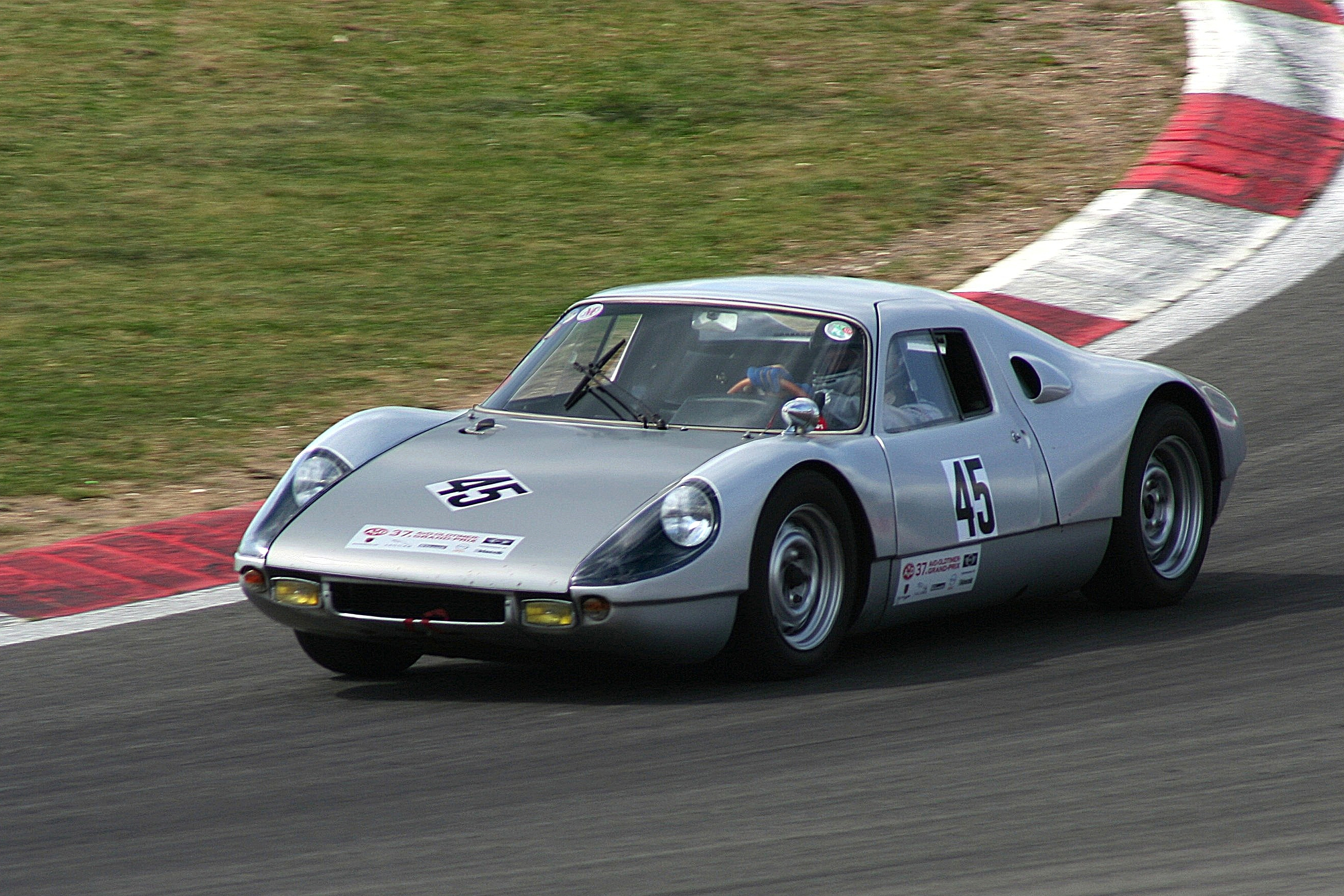 Porsche 904, Baujahr 1964, beim AvD-Oldtimer-Grand-Prix auf dem Nürburgring